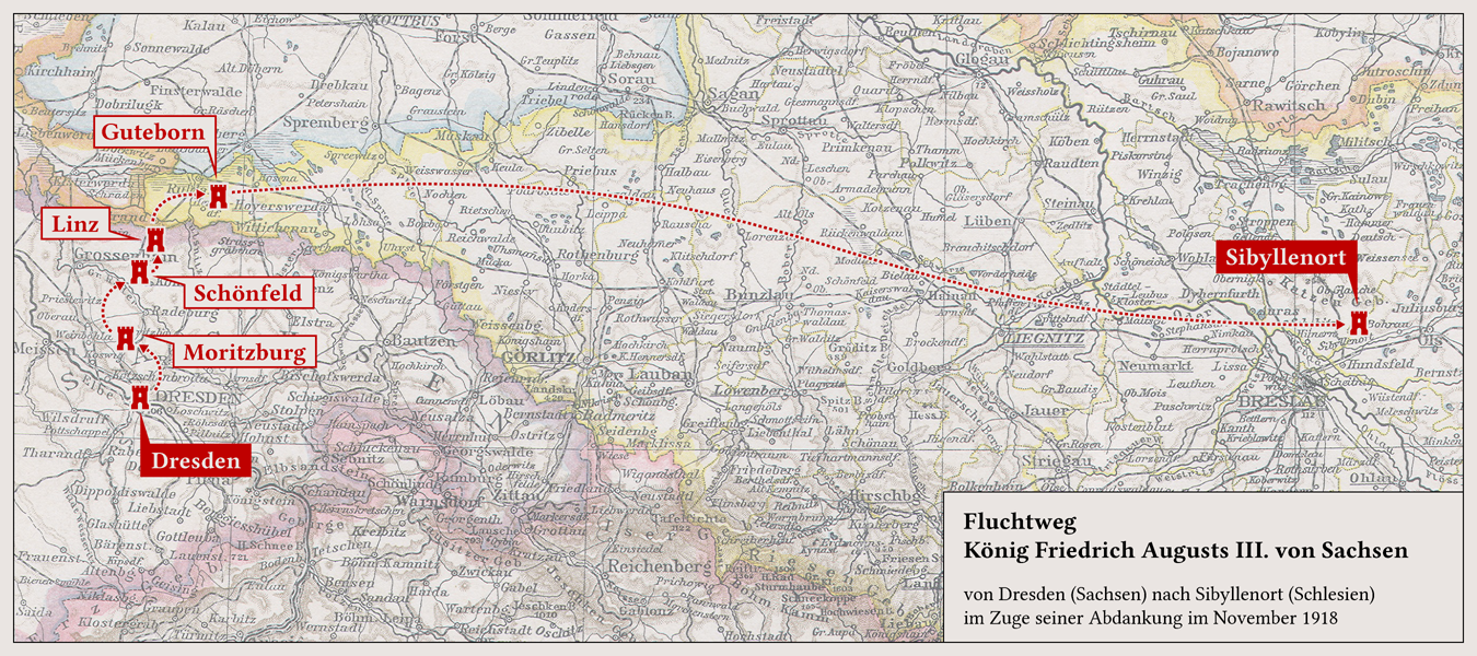 Fluchtweg König Friedrich Augusts III. von Sachsen von Dresden (Sachsen) nach Sibyllenort (Schlesien) im Zuge seiner Abdankung im November 1918